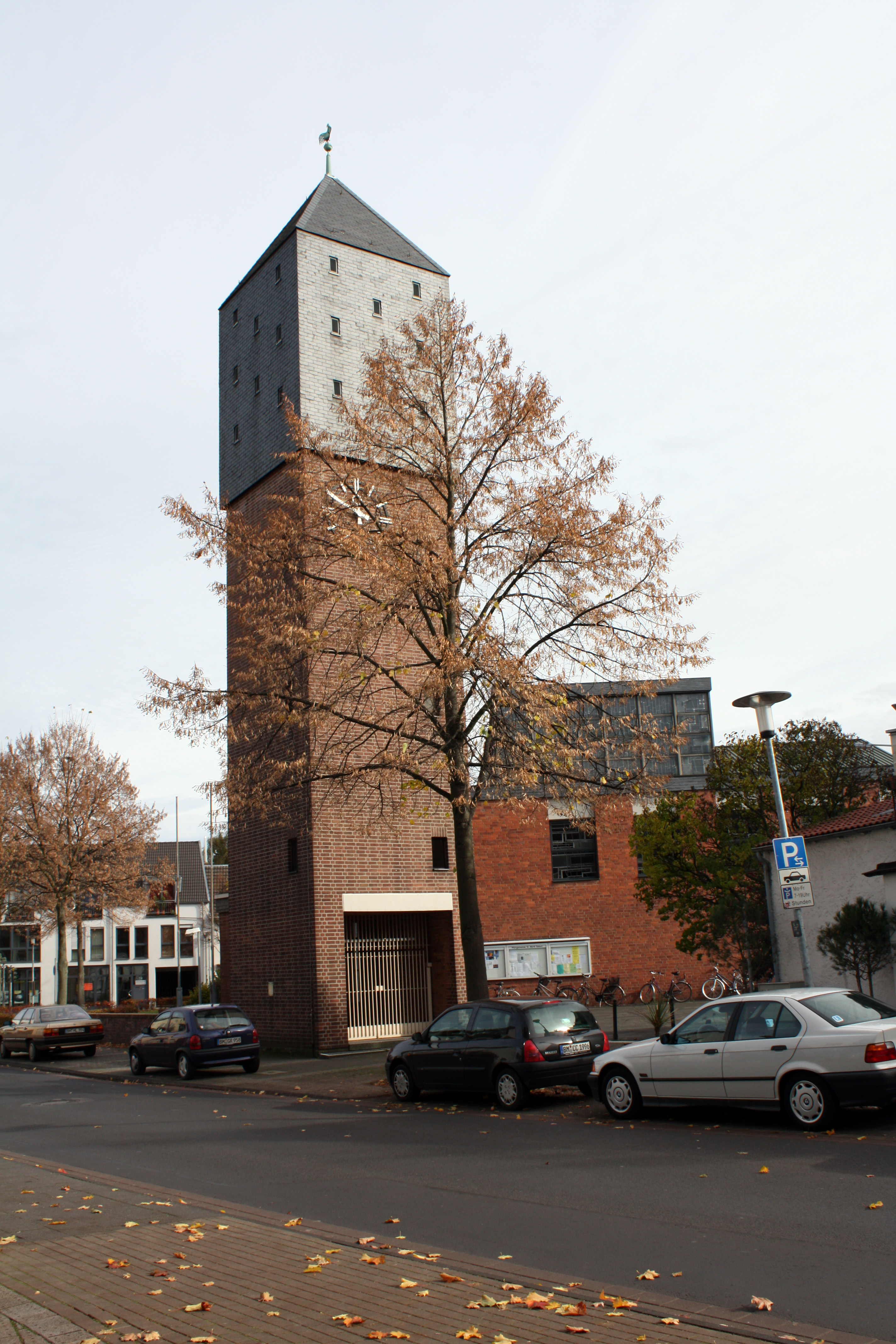 Efferen, St. Mariae Geburt